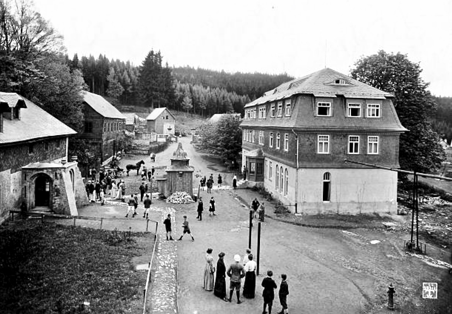 Freie Schulgemeinde Wickersdorf bei Saalfeld im Thüringer Wald – rechts das Alte Herrenhaus des ehemaligen Gutshofes (von der FSG als Haus der Mädchen genutzt), links der Eingang zum Speise-, Musik- und Theatersaal, dahinter das alte Forsthaus. Zwischen den Häusern erkennt man die Postkutsche, mit der gerade die Briefpost zugestellt wurde. Die Aufnahme wurde aus dem Obergeschoss des Schulhauses gemacht, in dem auch die ältesten Schüler wohnten.